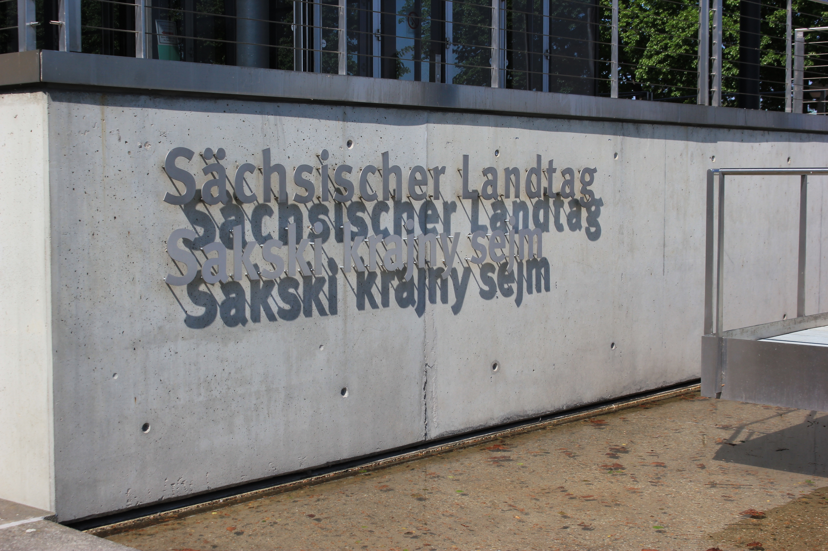 Hornjoserbsce: Němsko-serbski napis při Sakskim krajnym sejmje w Drježdźanach